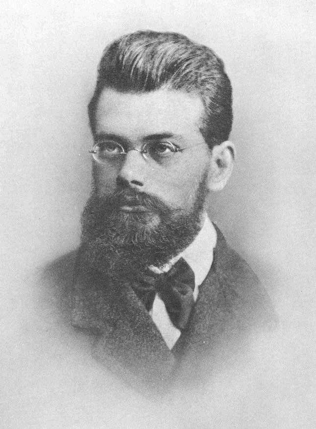 Ludwig Eduard Boltzmann (* 20. Februar 1844 in Wien; † 5. September 1906 in Duino bei Triest)